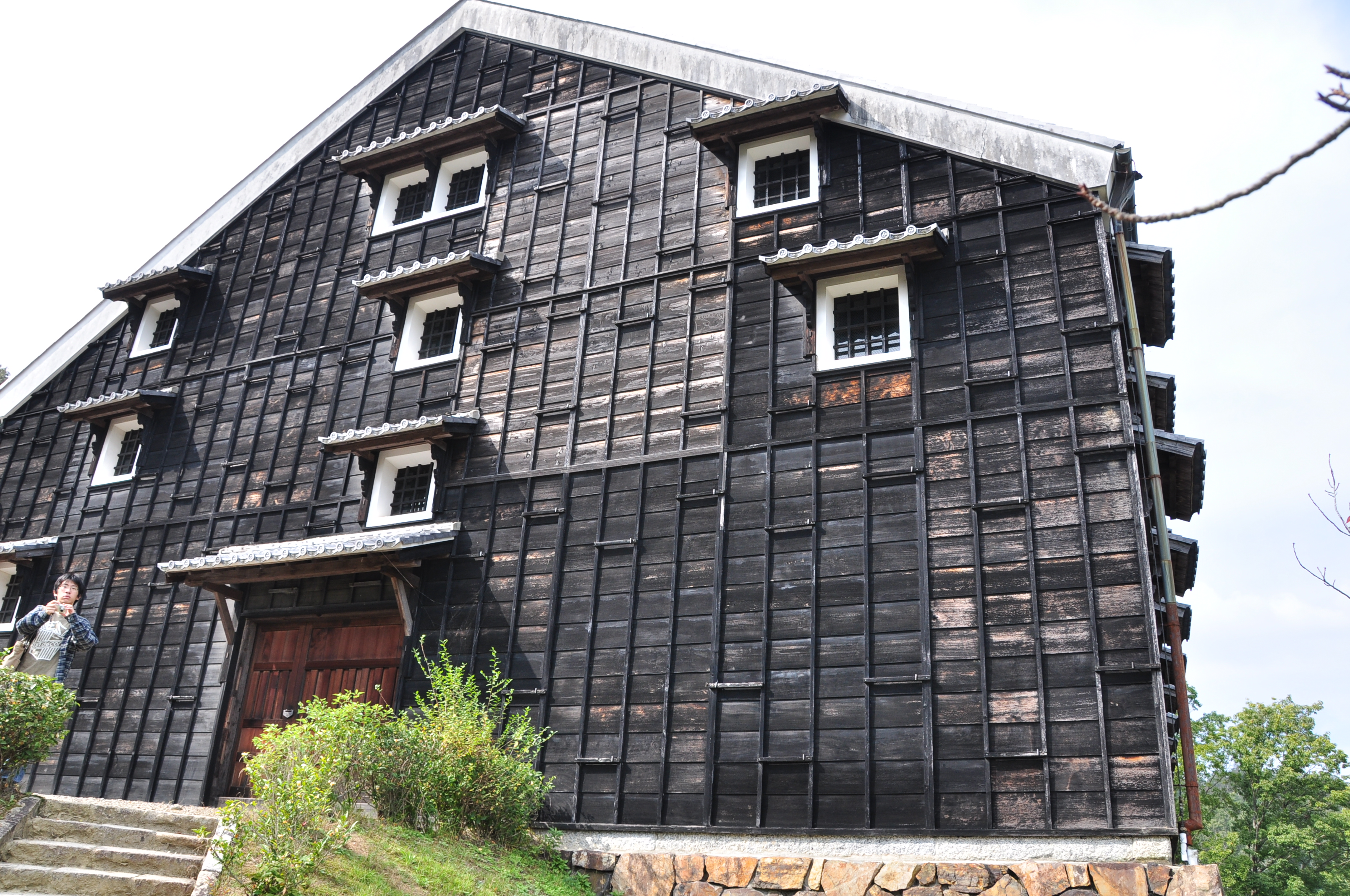 Museum Meiji Mura